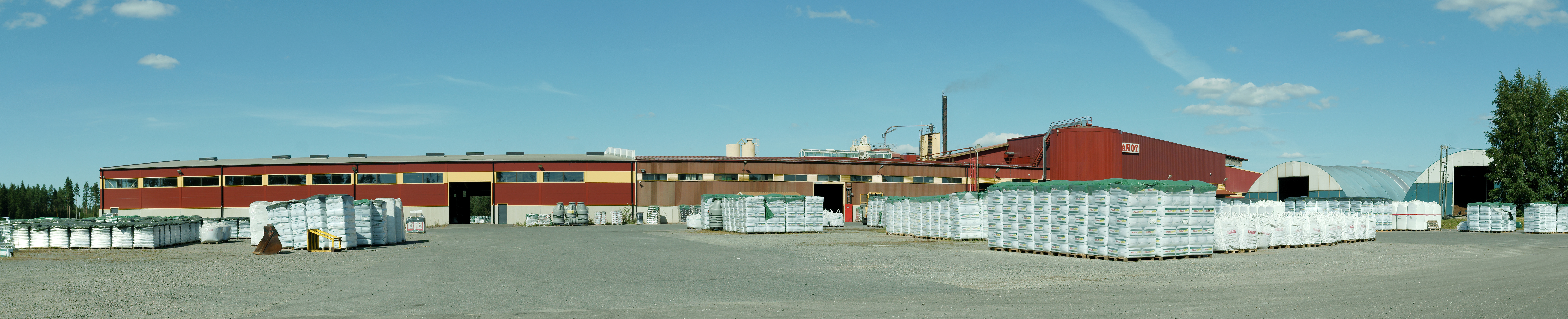 Biolanin tehdasalue Eurassa.